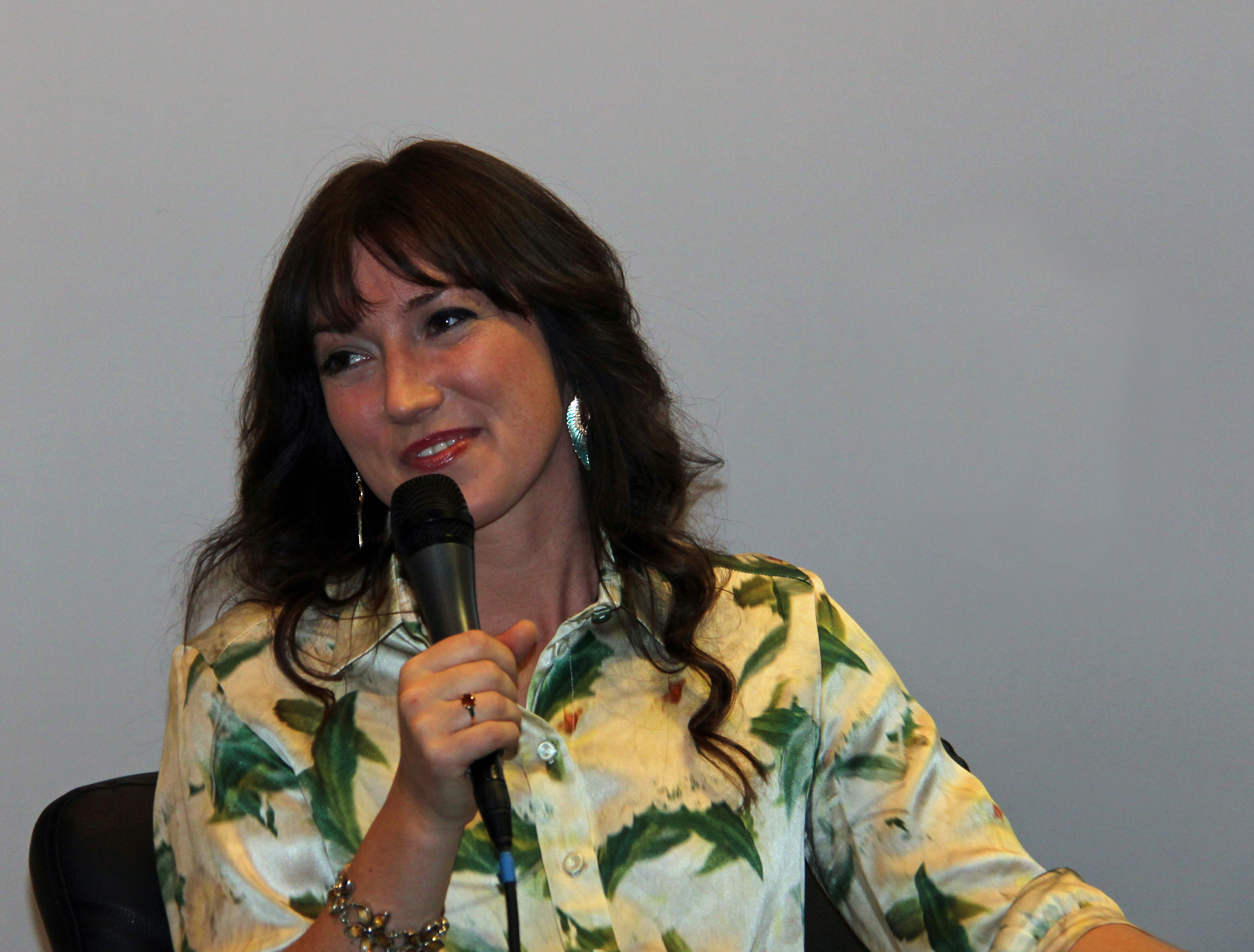 Charlotte Roche auf der Frankfurter Buchmesse 2011